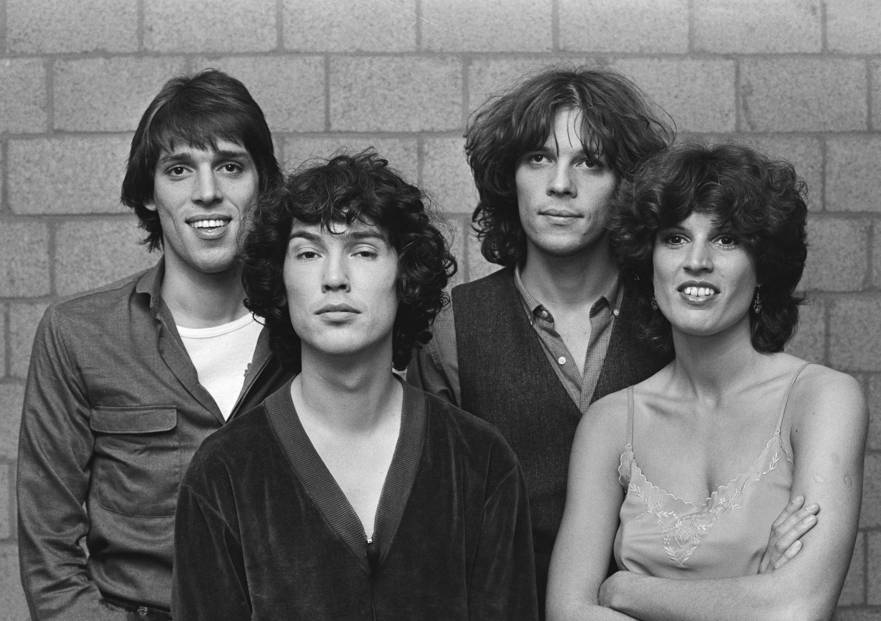 Generale repetitie voor AVRO-programma Edisons in concert Muziekcentrum Vredenburg te Utrecht, uitzending 31 augustus 1980, de groep Flairck